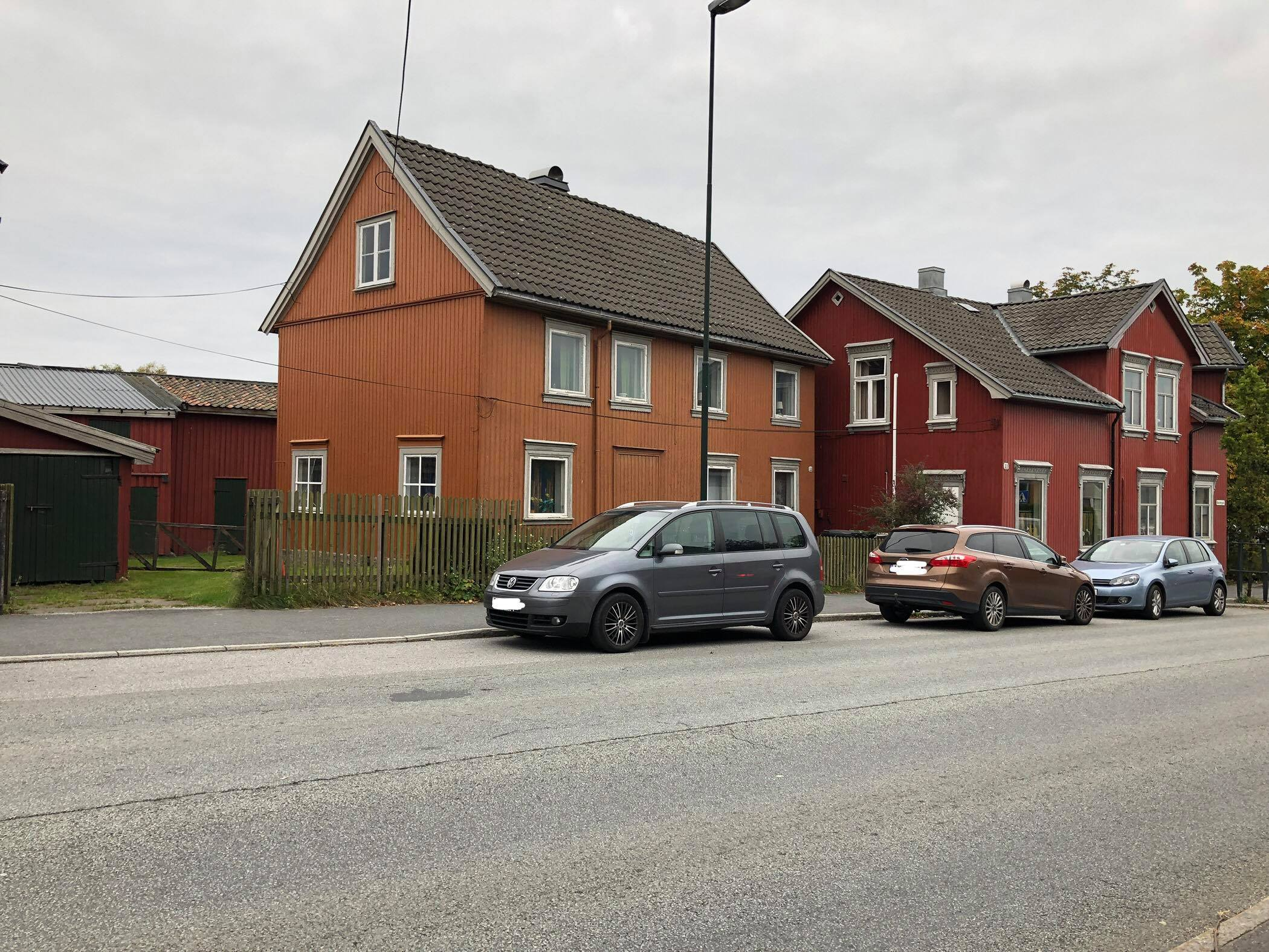 Klostergata 11